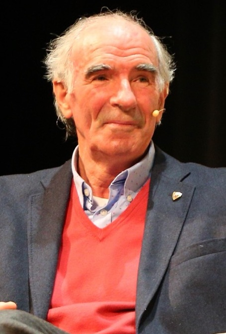 04 de febrero | 19:00 | Teatro Principal Luis Arconada y José Ángel Iribar. Coloquio moderado por Aitor Lagunas. Antolatzaileak: Real Sociedad Fundazioa, Fundación Athletic Club Laguntzailea: Donostia Kultura Argazkiak / Fotos: Real Sociedad